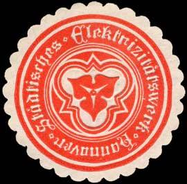 Sealing stamp Title: Städtisches Elektrizitätswerk Hannover Description: Strom, rot, weiß, geprägt Place: Hannover size: 4 cm